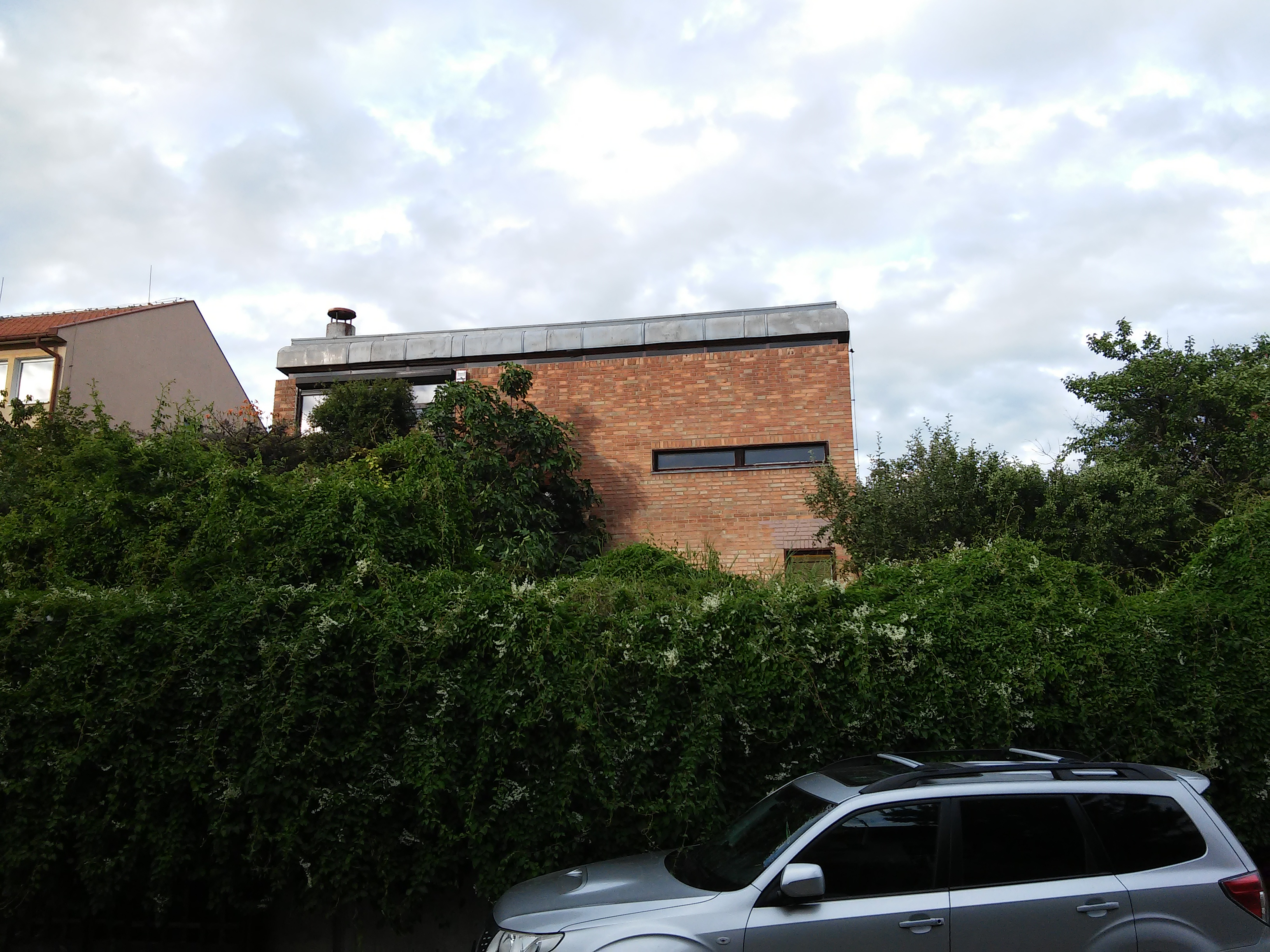 Rodinný dom Ivana Matušíka, Buková, Nad lomom, Staré Mesto, Bratislava